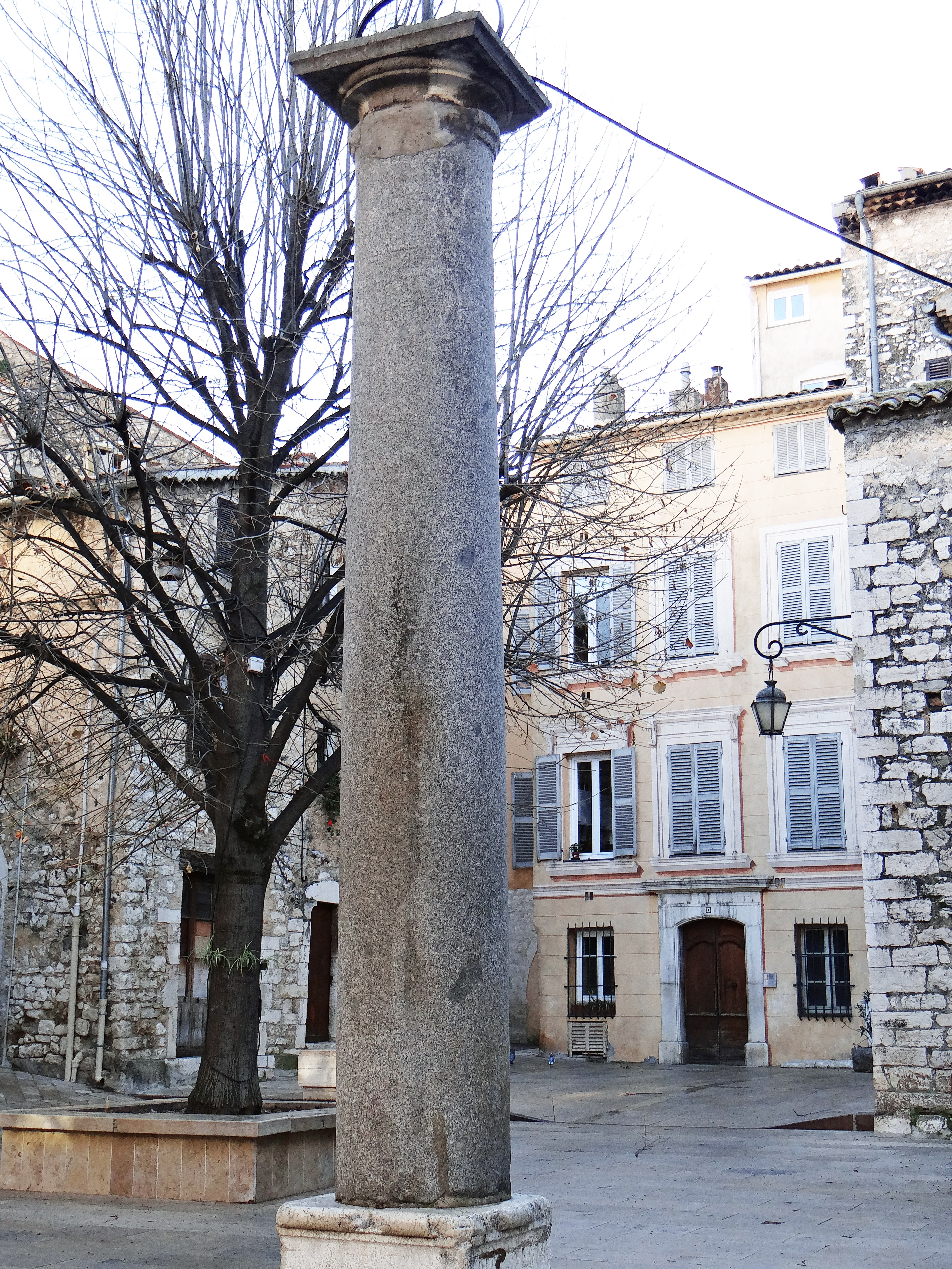 Vence - Colonne romaine de la place Godeau